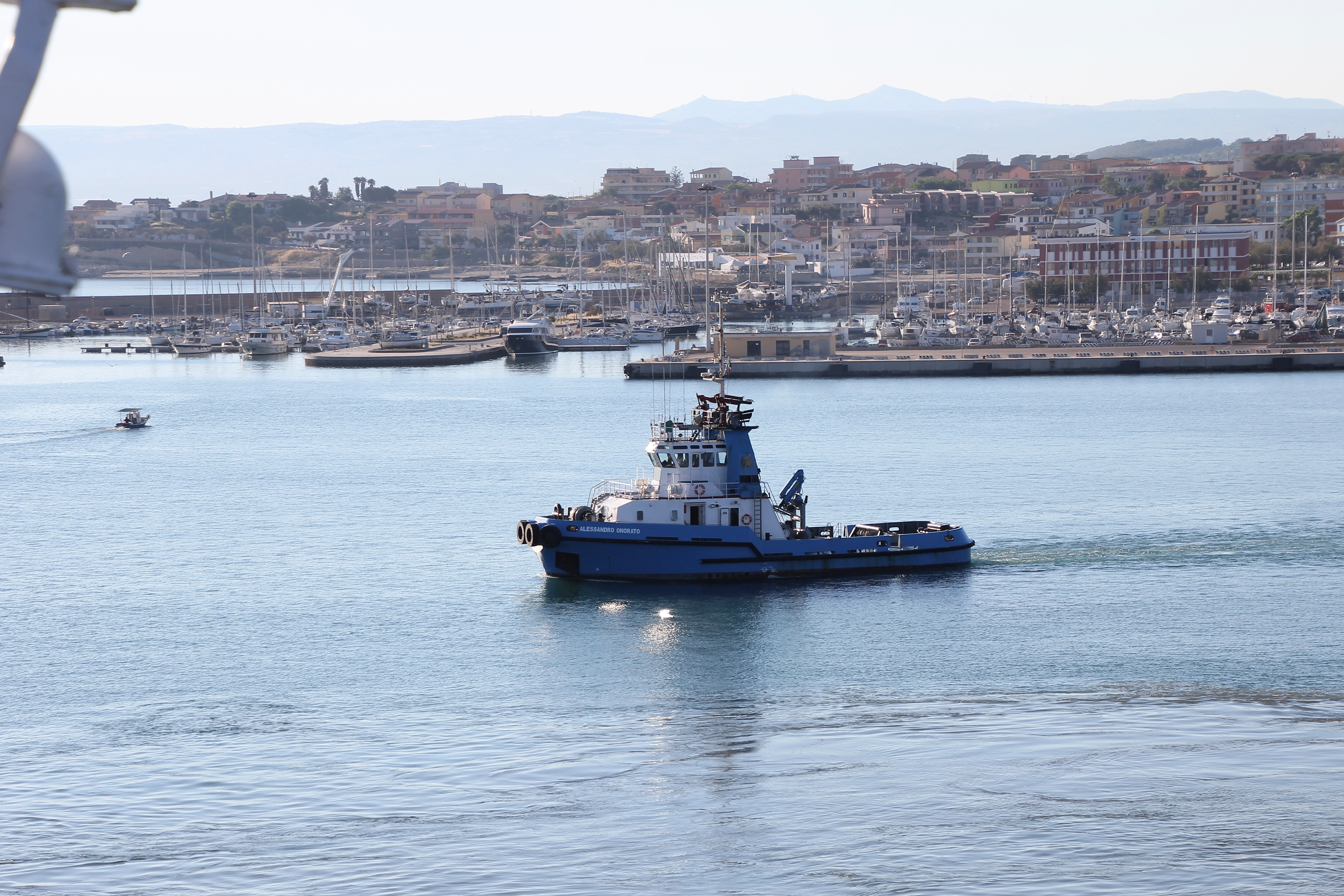 Rimorchiatore Alessandro Onorato